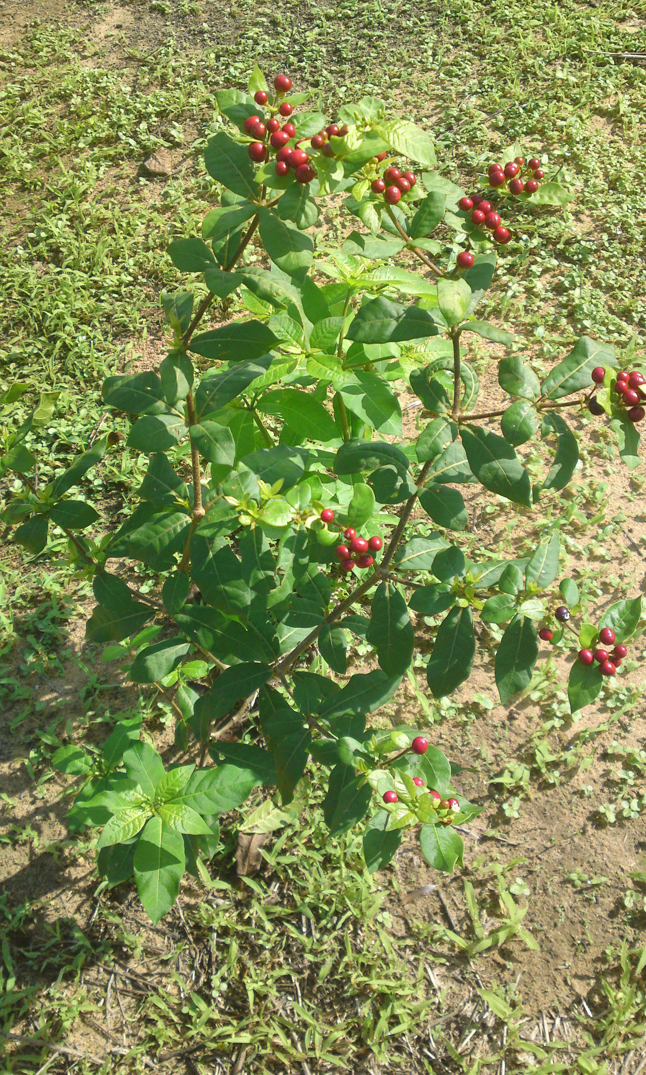 Arbusto de hasta 2.5m de altura, las ramas suelen tener pelitos. Las hojas son más largas que anchas y miden de 5 a 18cm de largo. Sus flores son blanco-verdosas a amarillentas. Los frutos tienen de 1 a 2 semillas. Origen desconocido, habita en clima cálido desde los 30 a los 100msnm. Asociado a vegetación perturbada de bosques tropicales caducifolio y subcaducifolio